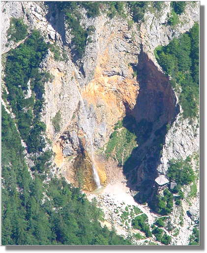 Slap Savinje - Rinka